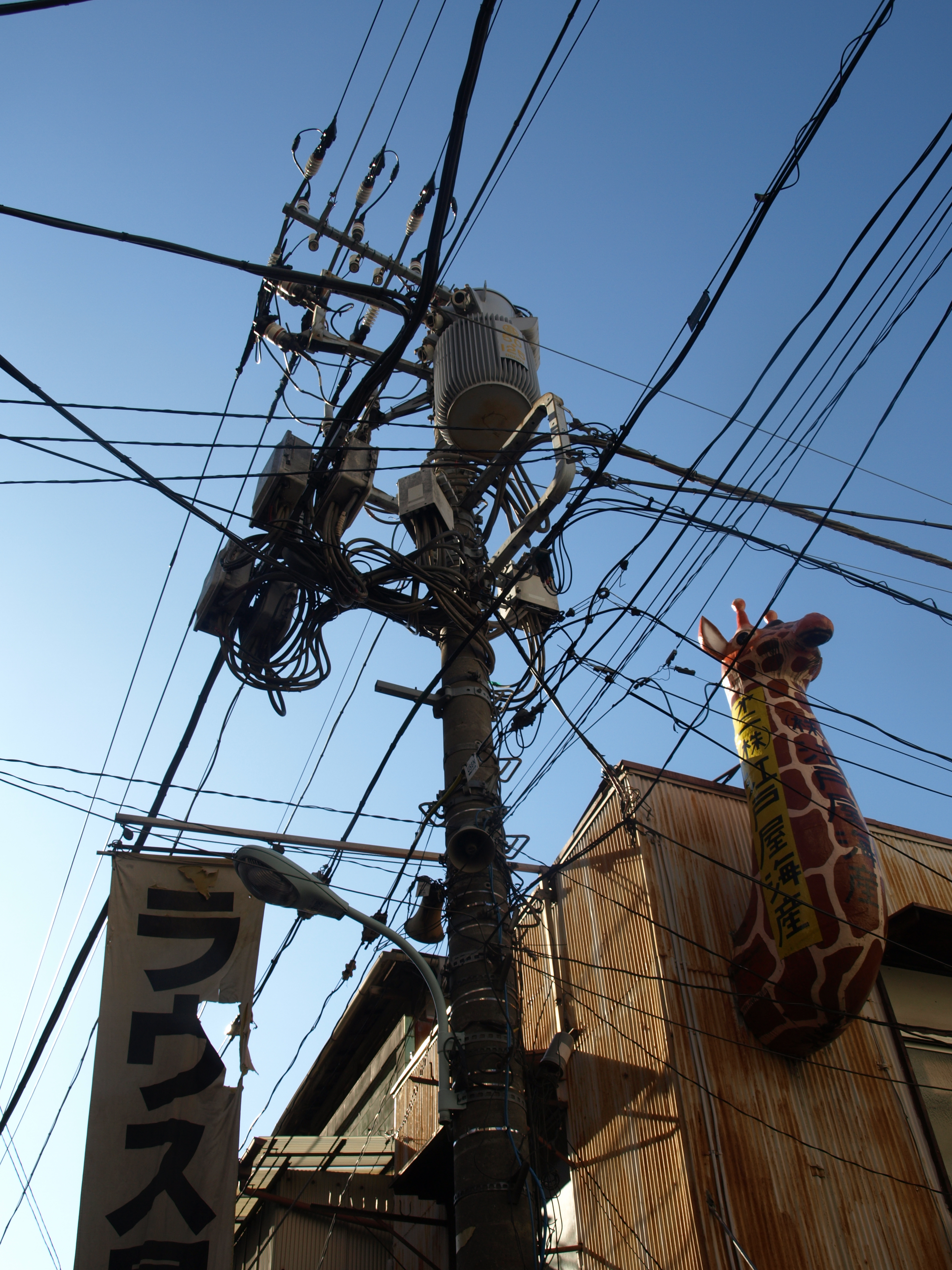 Ein typischer Strommast in einem Vorort von Tokio. Die offene Bauweise ist typisch für Japen. Sowohl Strom, als auch Telefon und Dateinkabel verlaufen in Japan größtenteils überirdisch.